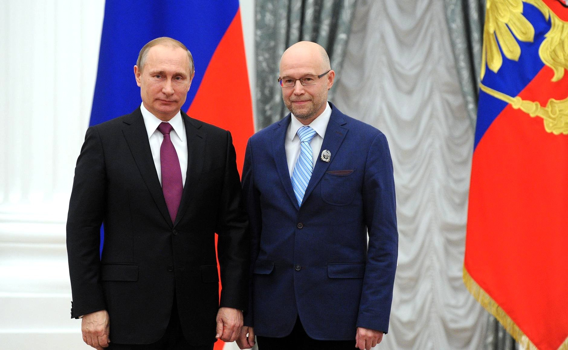 Вручение премий Президента молодым деятелям культуры и премий за произведения для детей и юношества. Премии Президента в области литературы и искусства за произведения для детей и юношества 2015 года удостоен режиссер Константин Бронзит